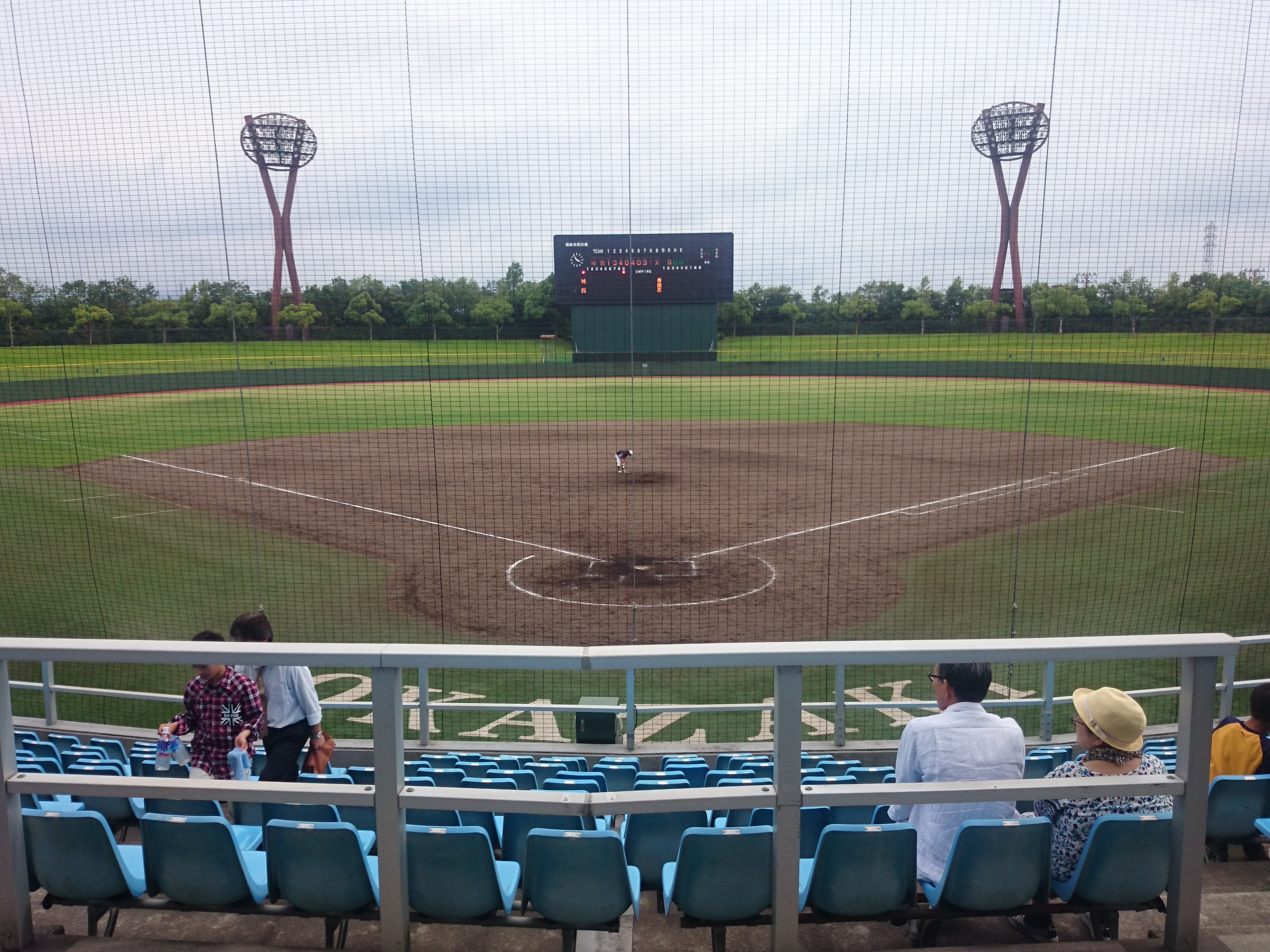 岡崎市民球場を内野席から眺める。